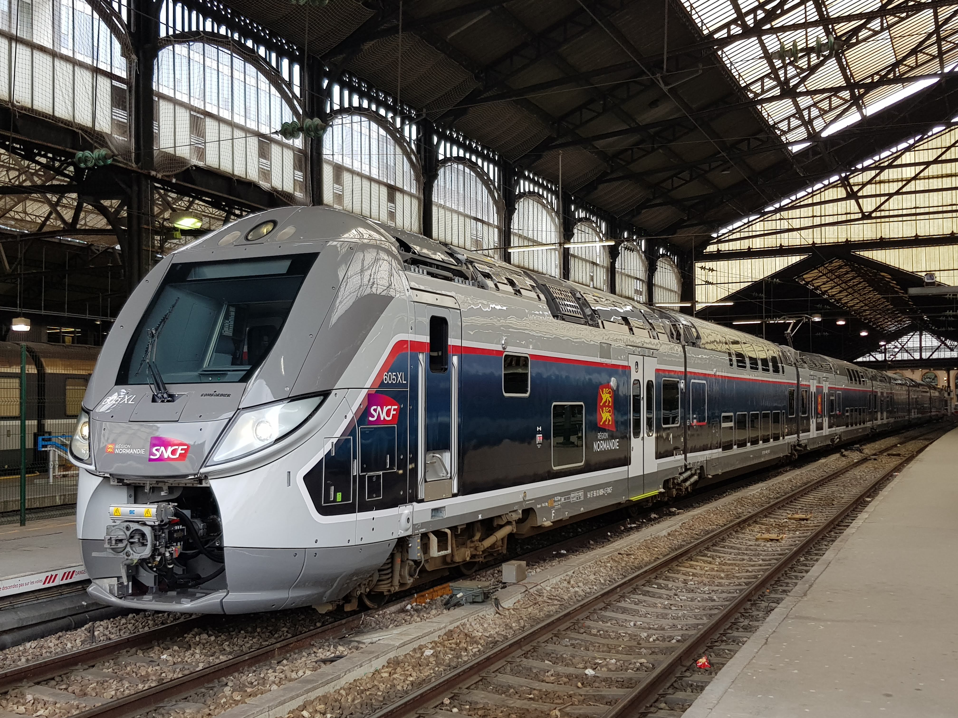 Nouvelle rame Omnéo Premium en test en gare de Paris-Saint-Lazare.